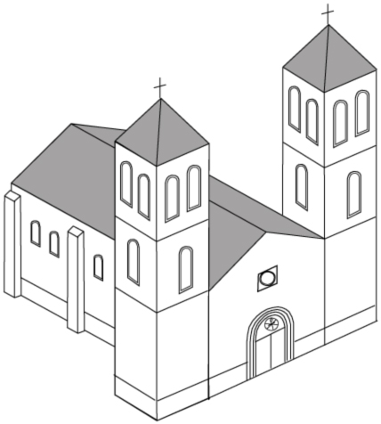 Iglesia de San Pedro (Tudela), desaparecida; reconstrucción del edificio para principios del siglo XIX.